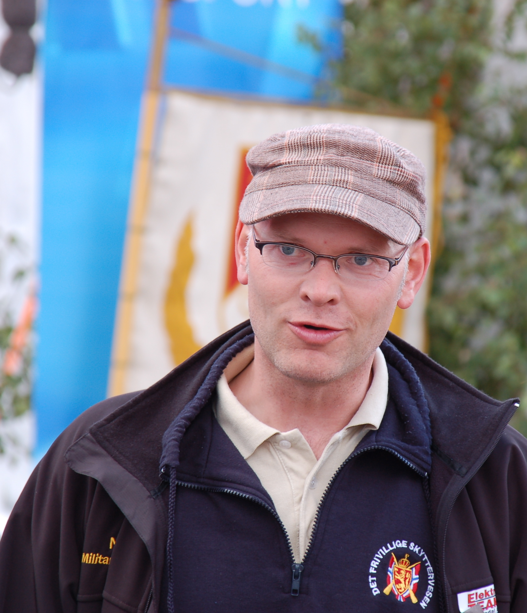 Gunnar Halbjørhus, Hemsedal, skytterkonge 2003